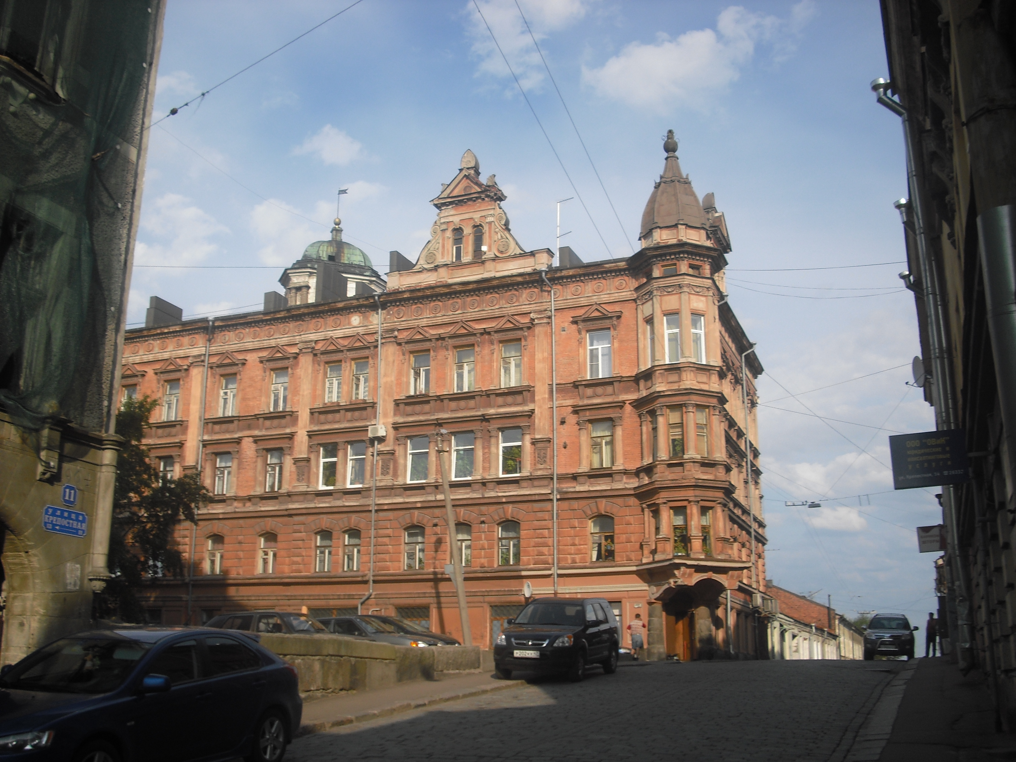 Доходный дом Эмиля Буттенхоффа на улице Крепостной в Выборге